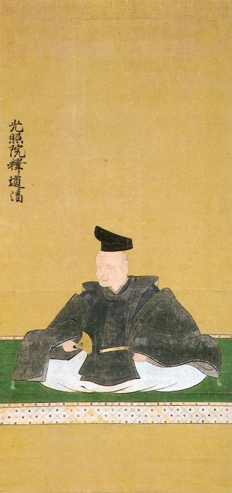 渡辺重綱の肖像。